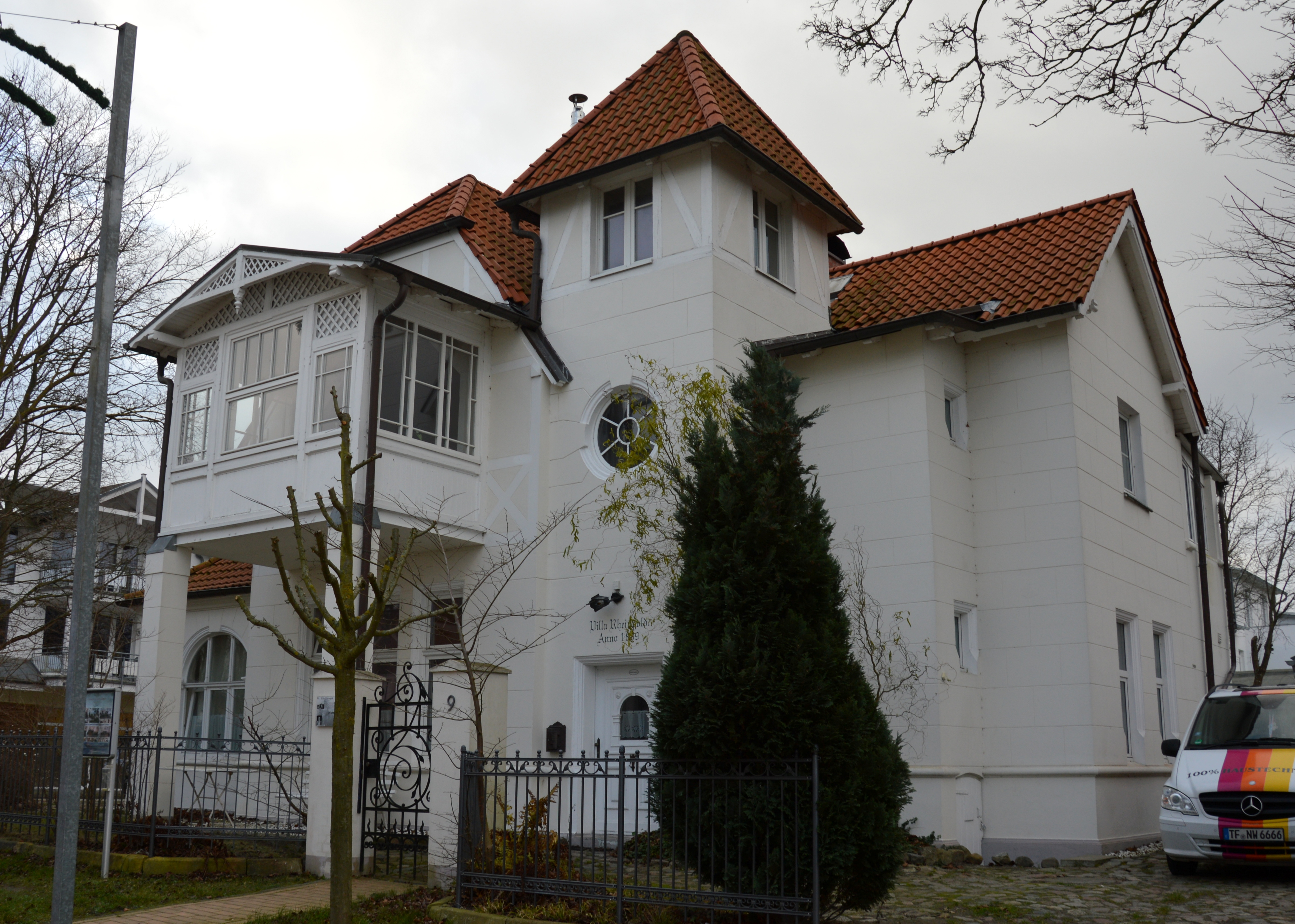 Villa Rheingold 2017